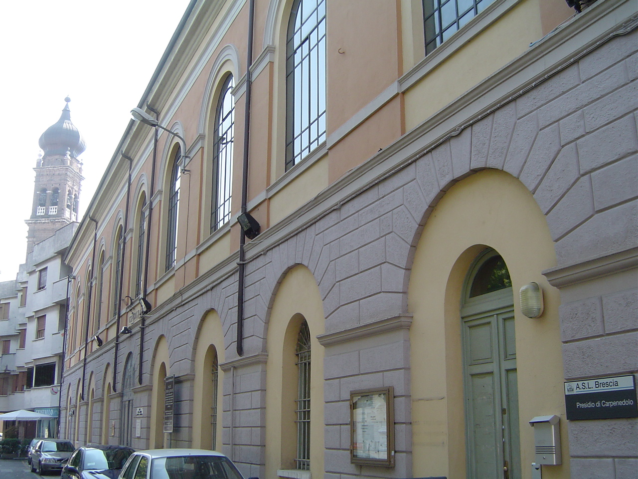 Palazzo Deodato Laffranchi a Carpenedolo